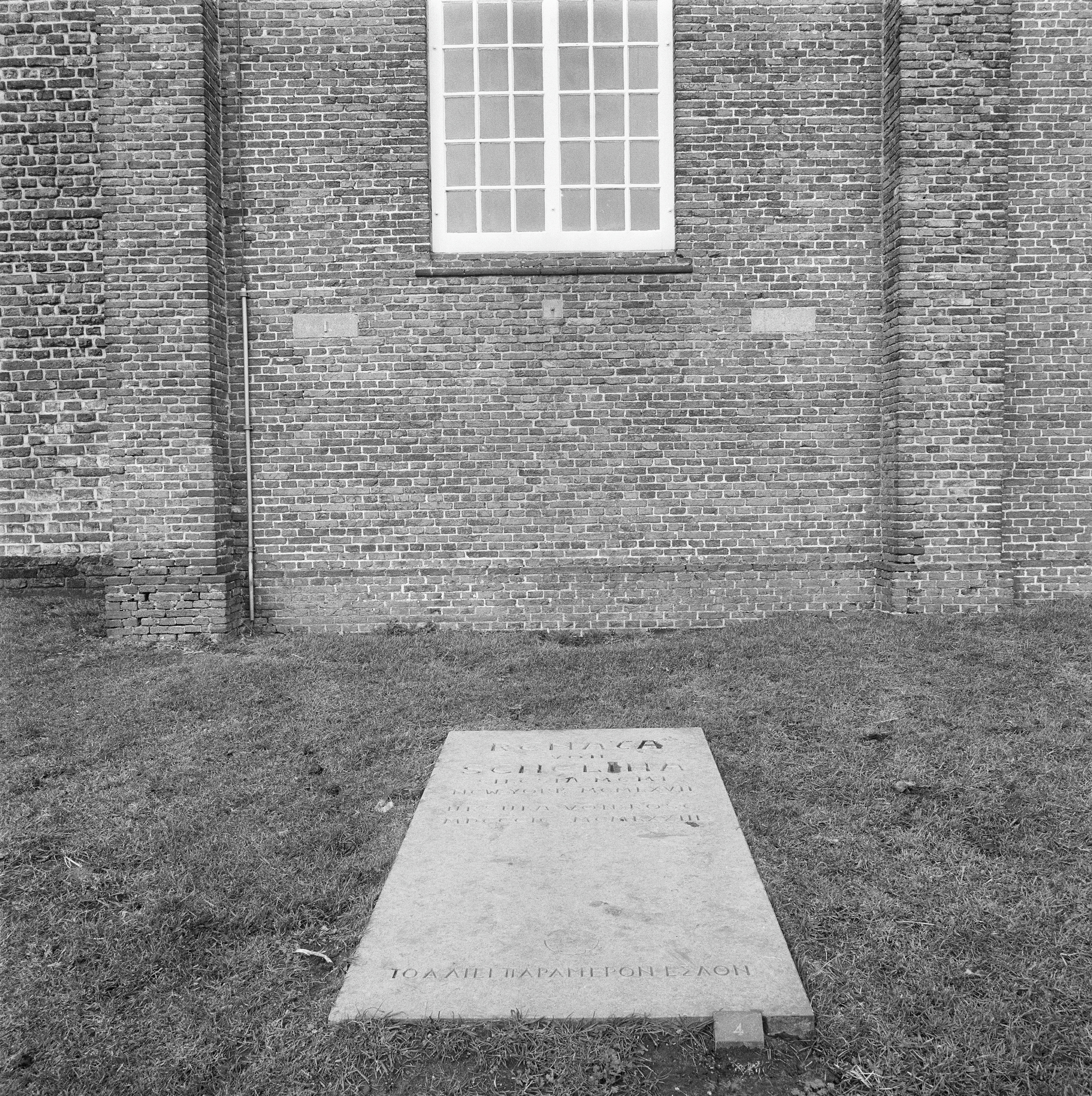 Nederlands Hervormde Kerk: Exterieur KERKHOF, GRAFZERK